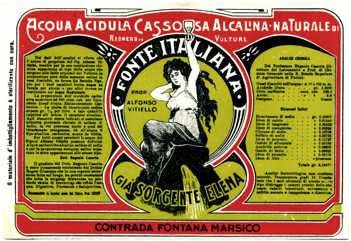 Fonte italiana, etichetta dell'acqua da tavola imbottigliata alla fonte del Rionero in Vulture (PT), sec. XX inizio (AS Potenza, Fondo Prefettura, Atti amministrativi, b. 383)